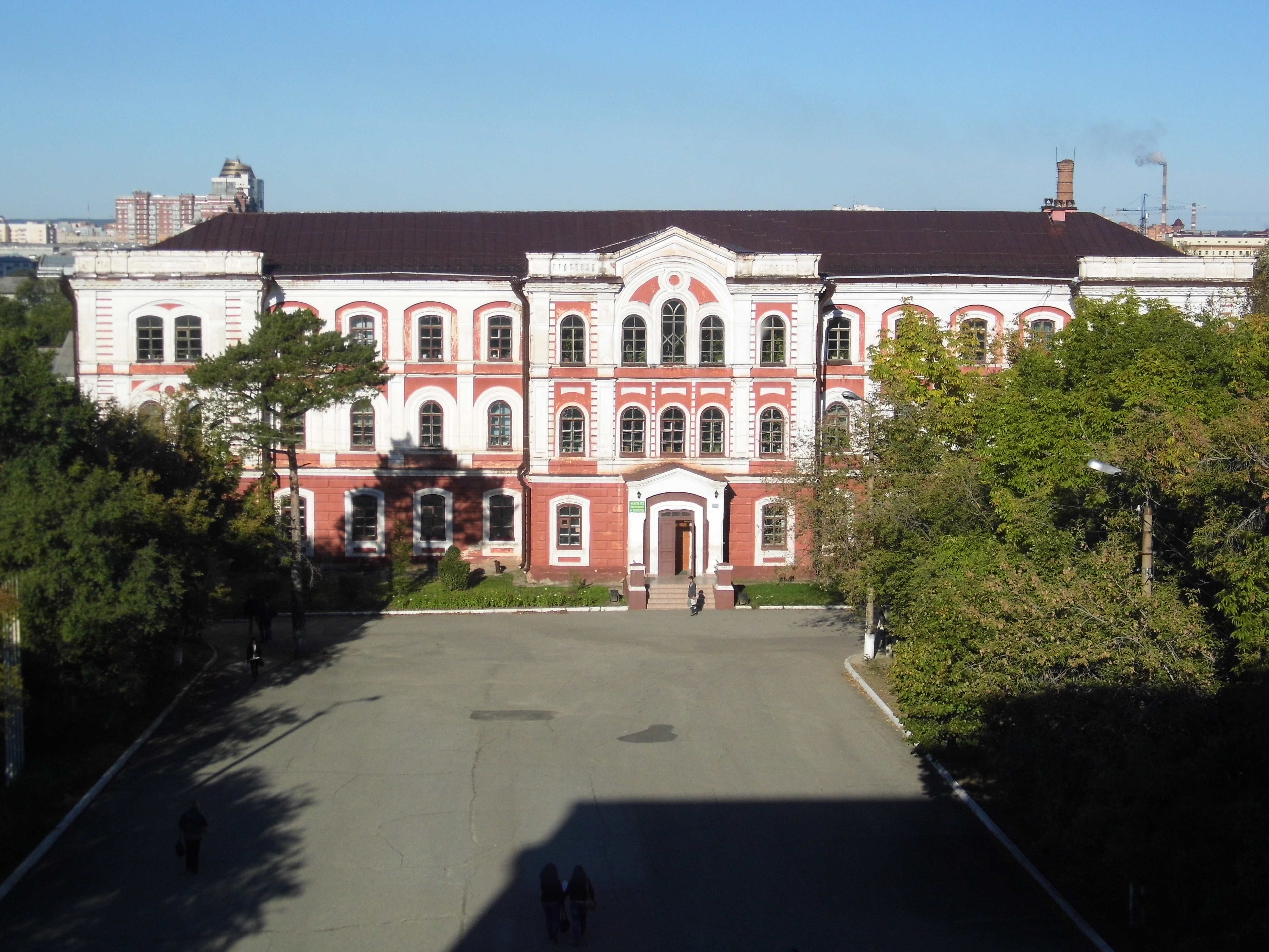 В 1920-е гг.-амурский индустриальный техникум и художественно-промышленное училище. В 1930-е гг.-автодорожный техникум,а с 1950-ч гг- Благовещенский сельскохозяйственный институт,ныне переименован в Дальневосточный государственный аграрный университет.